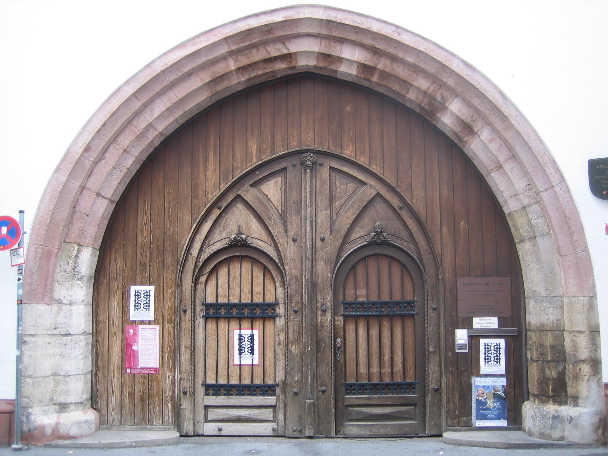 Martinus Bibliothek in der Grebenstraße Mainz